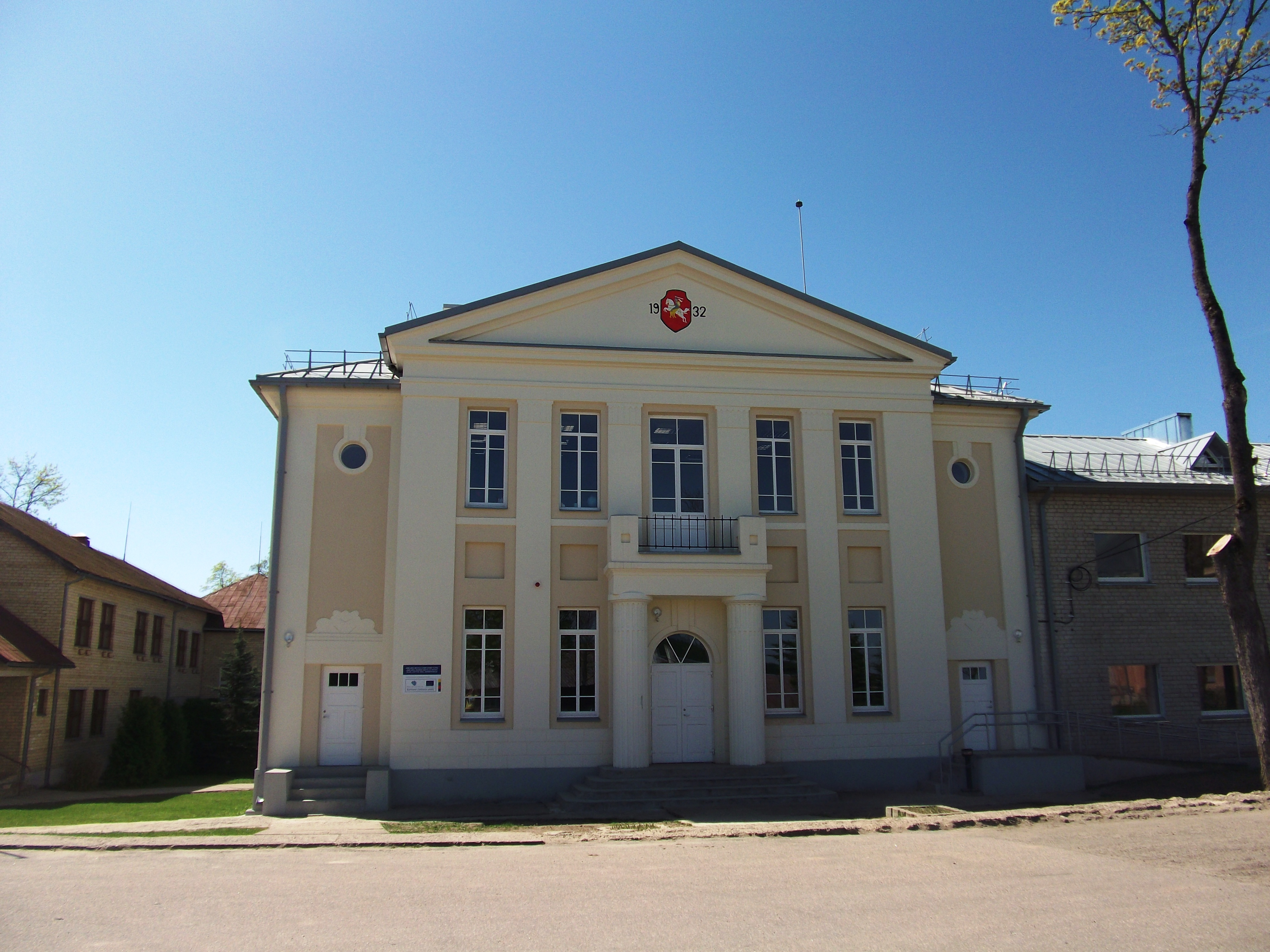 Semeliškių vidurinė mokykla